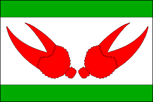 vlajka,Černá , okres Žďár nad Sázavou